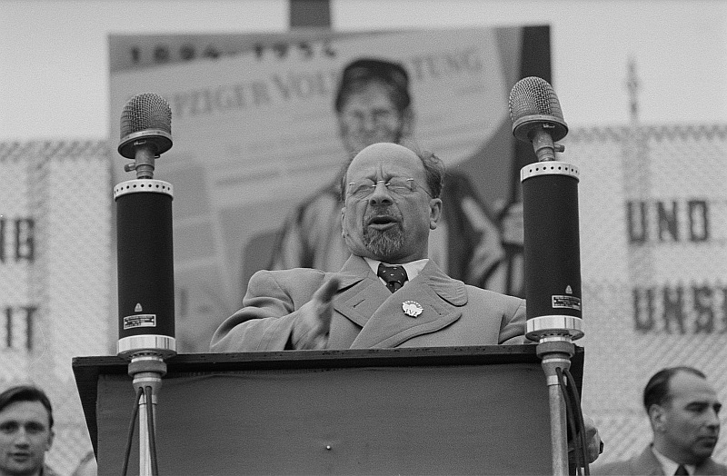 Original image description from the Deutsche Fotothek Walter Ulbricht spricht auf dem Karl-Marx-Platz anläßlich der Festivität zum 60jährigen Bestehen der Leipziger Volkszeitung